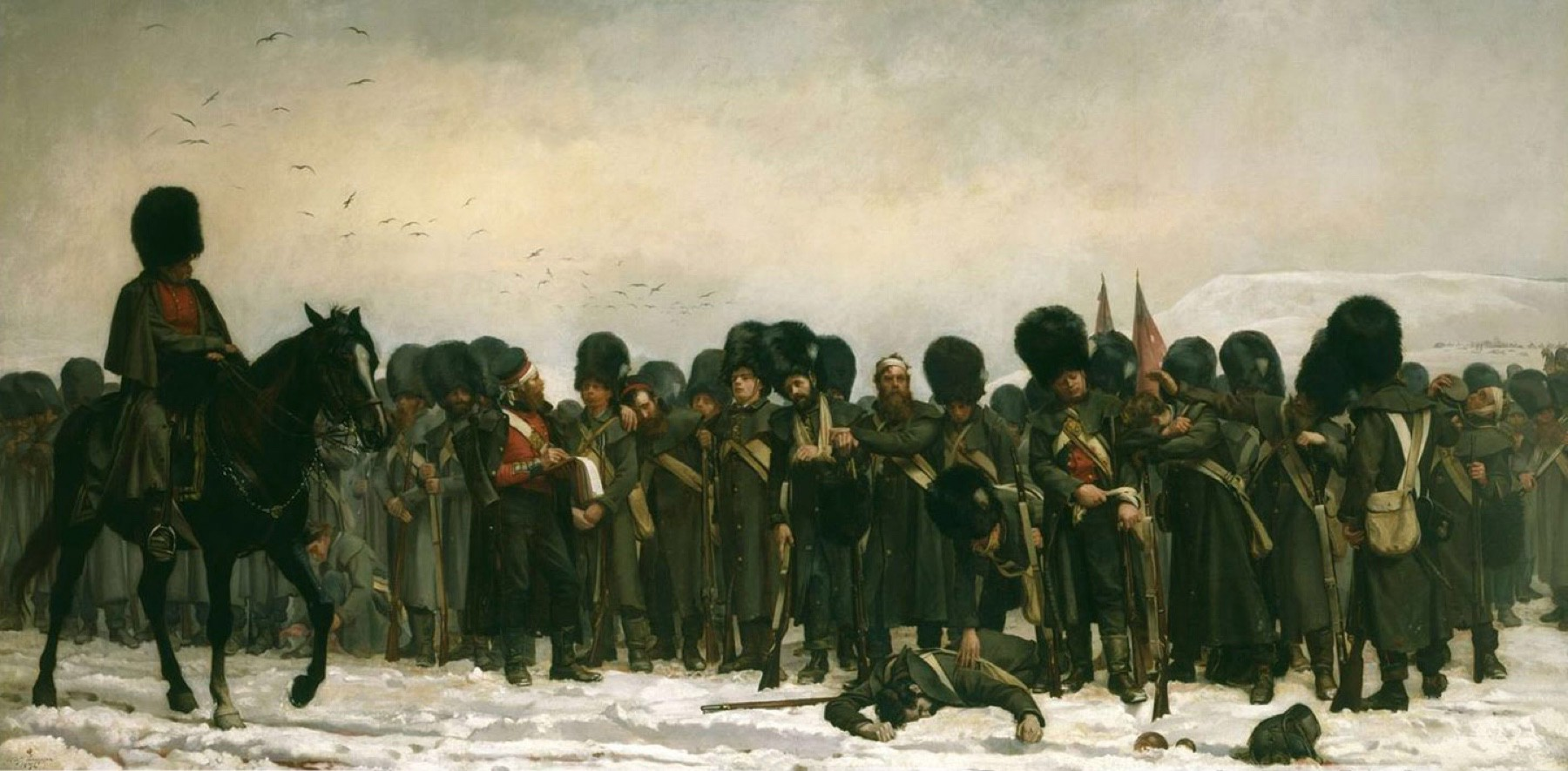 Granaderos de la Guardia tras la batalla.